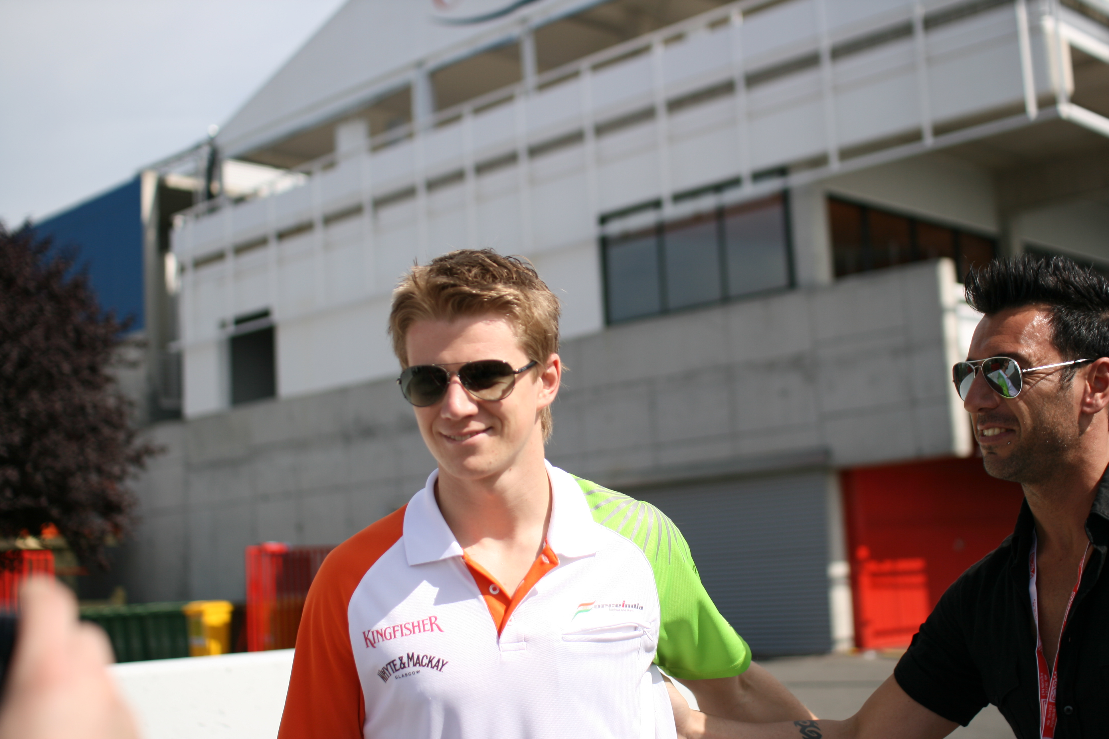 Nico Hülkenberg